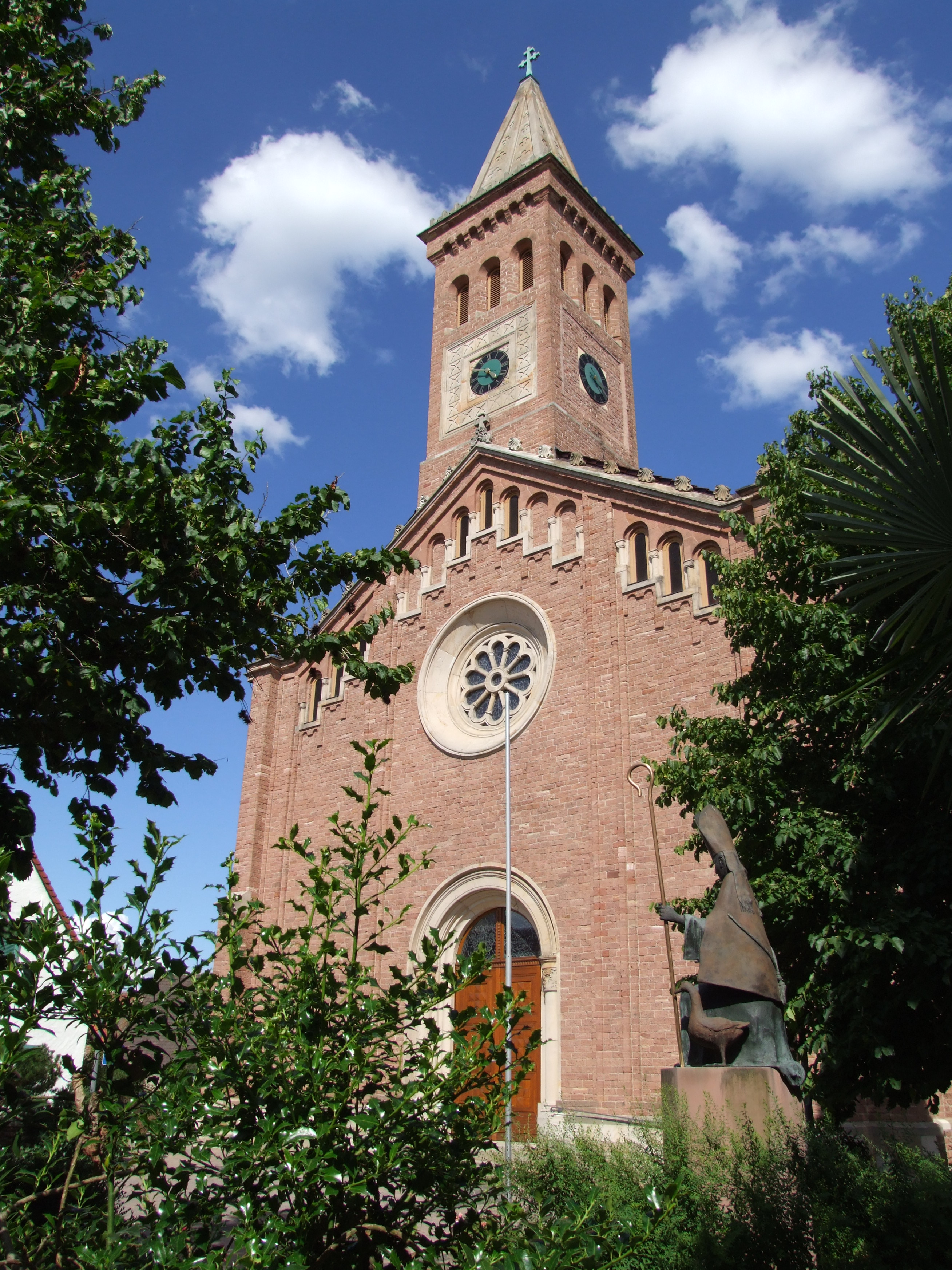 katholische Kirche St. Martin (Waldsee) - Haupteingang aus Südwesten